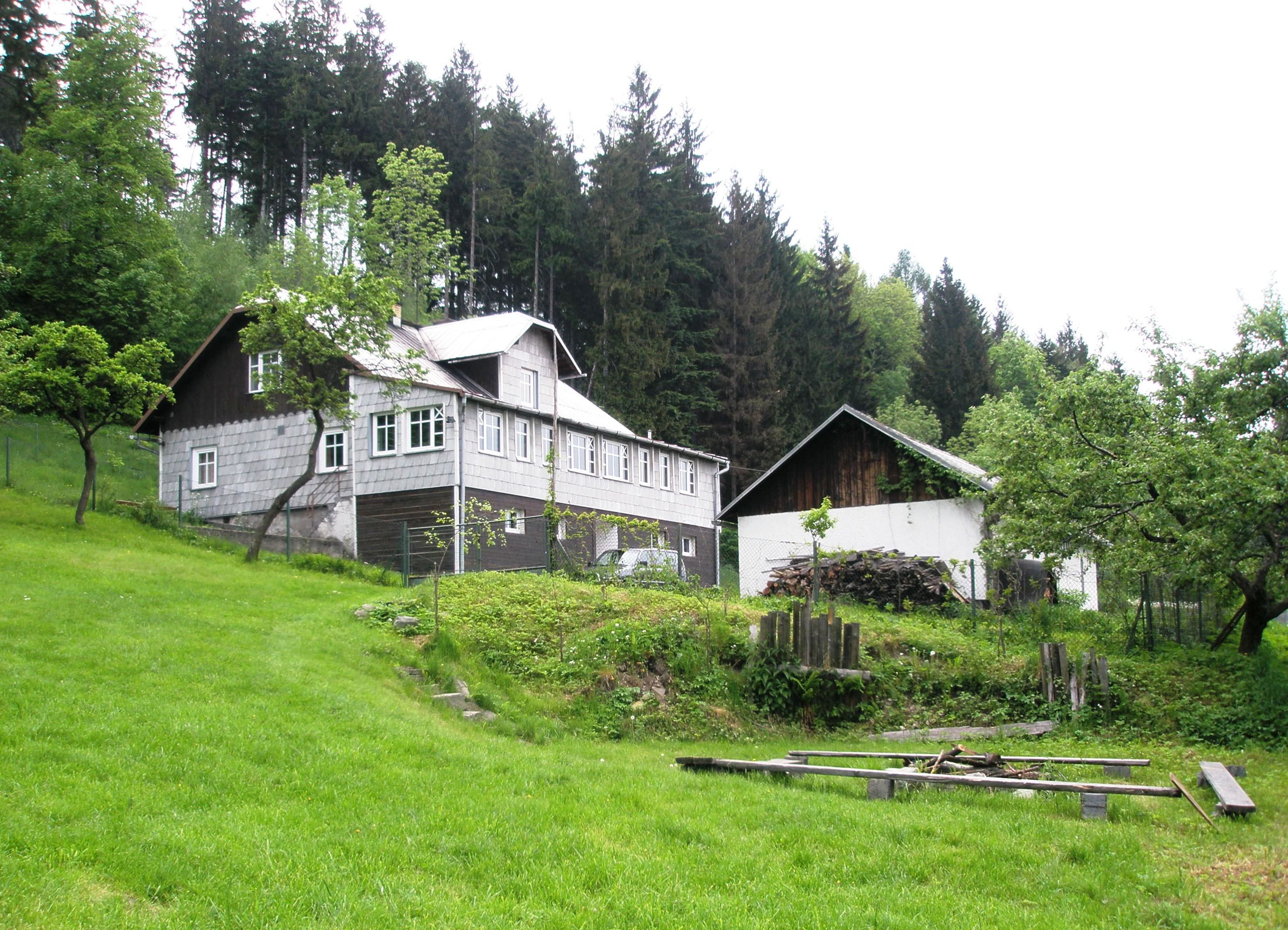 Oldřichovice, chata Lípa (evangelické rekreační středisko)